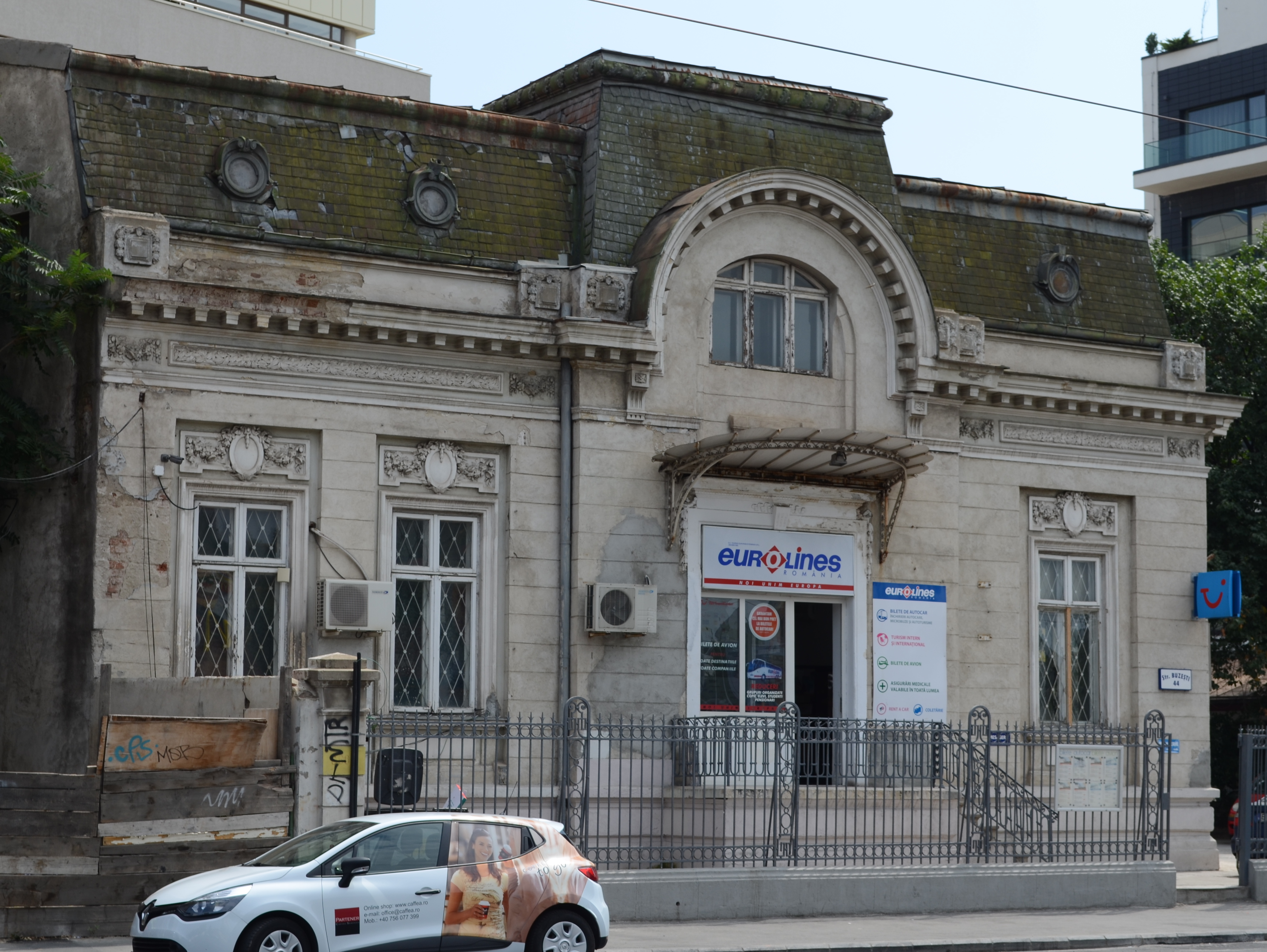 Casă, Str. Buzești nr. 44